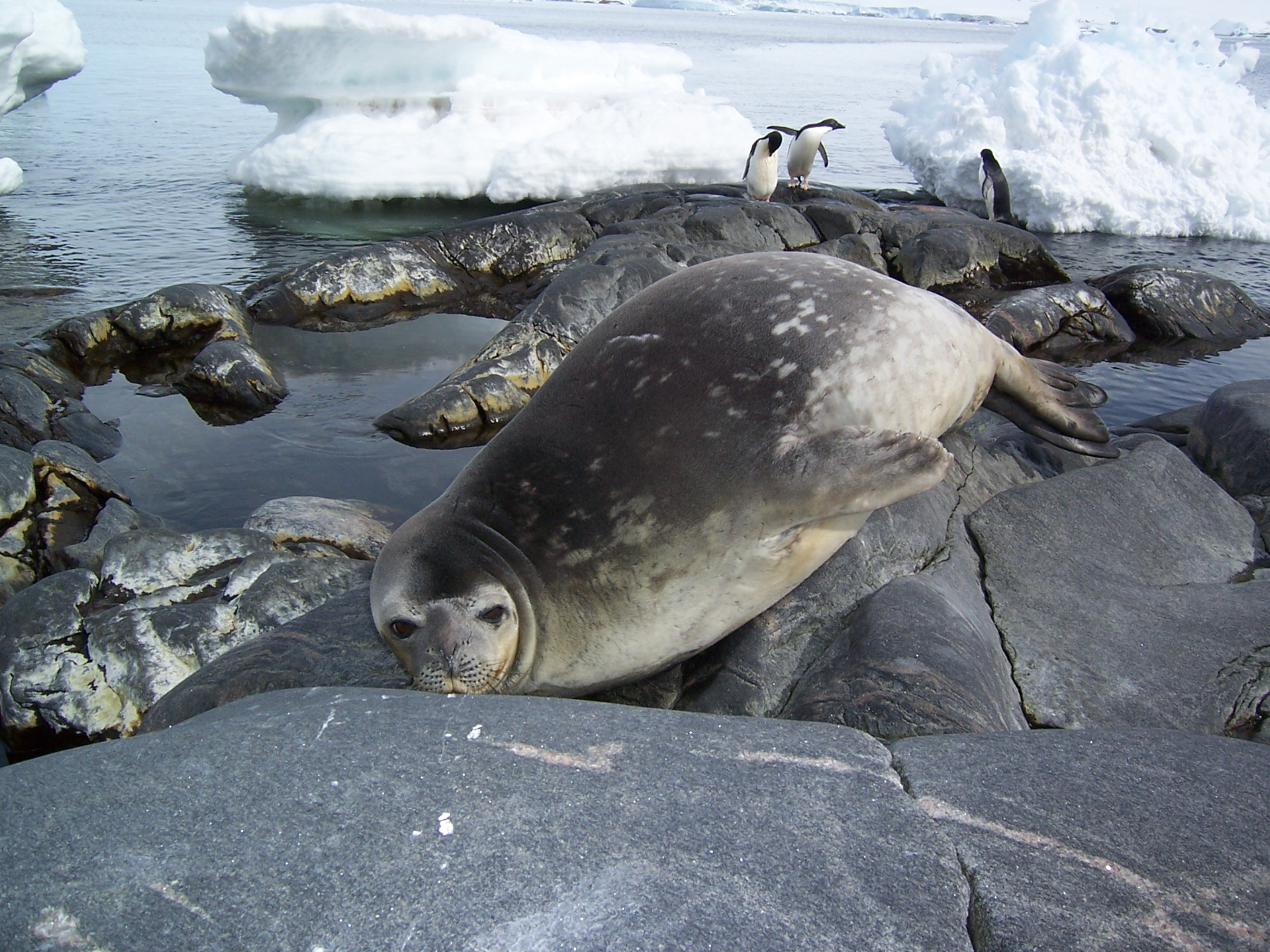 Phoque de Wedell et manchots Adélies pris sur la pointe sud de l'île des Pétrels, abritant la base Française Dumont d'Urville